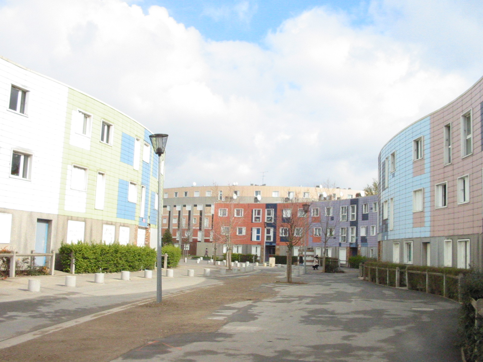 La Grande Borne, rue du Labyrinthe à Grigny (Essonne, France).